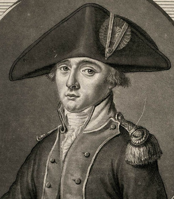 extrait du portrait d'André Désilles issu de la collection de gravures collectées par Louis-Philippe entre 1825 et 1848 fonds : Château de Versailles et de Trianon N°identification : INV.GRAV.LP 83.77 bis.1